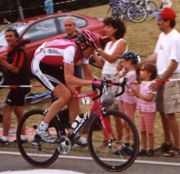 Rolf Aldag bei der Deutschen Radmeisterschaft in Freiburg 2004